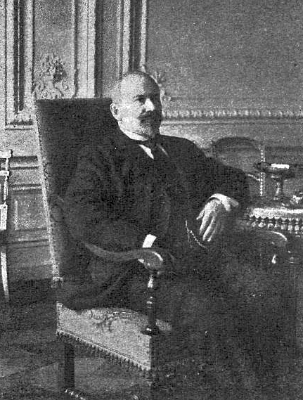 Шегловитов Иван Григорьевич